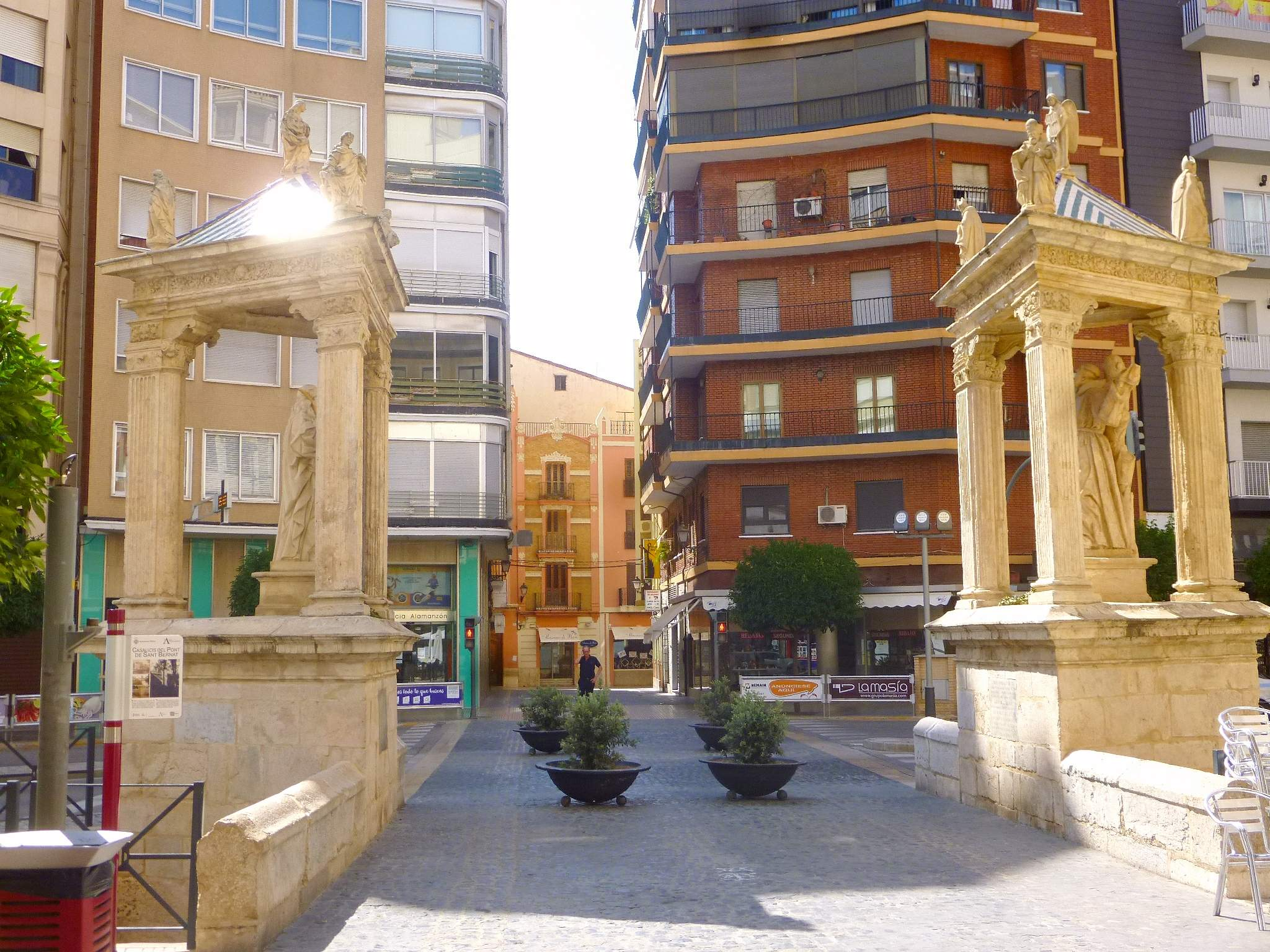 Casalicios del Pont de Sant Bernat (Alcira, Valencia)